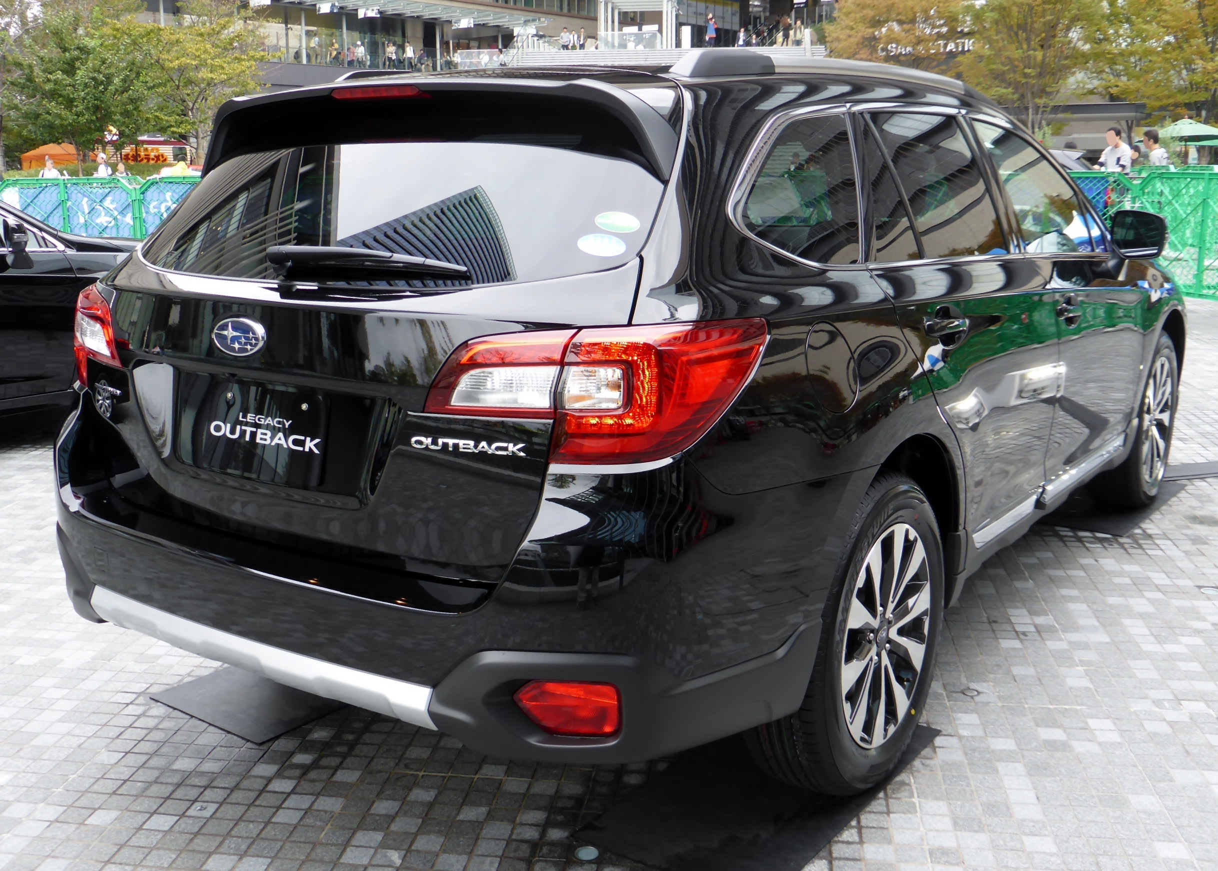 BS9型スバル・レガシィアウトバックリミテッドをリアから撮影。